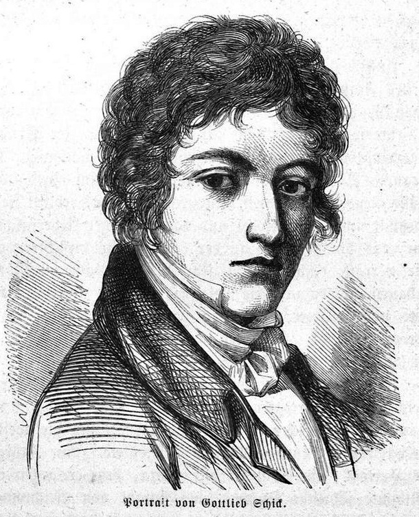 Bildnis des Malers Gottlieb Schick (1776–1812)